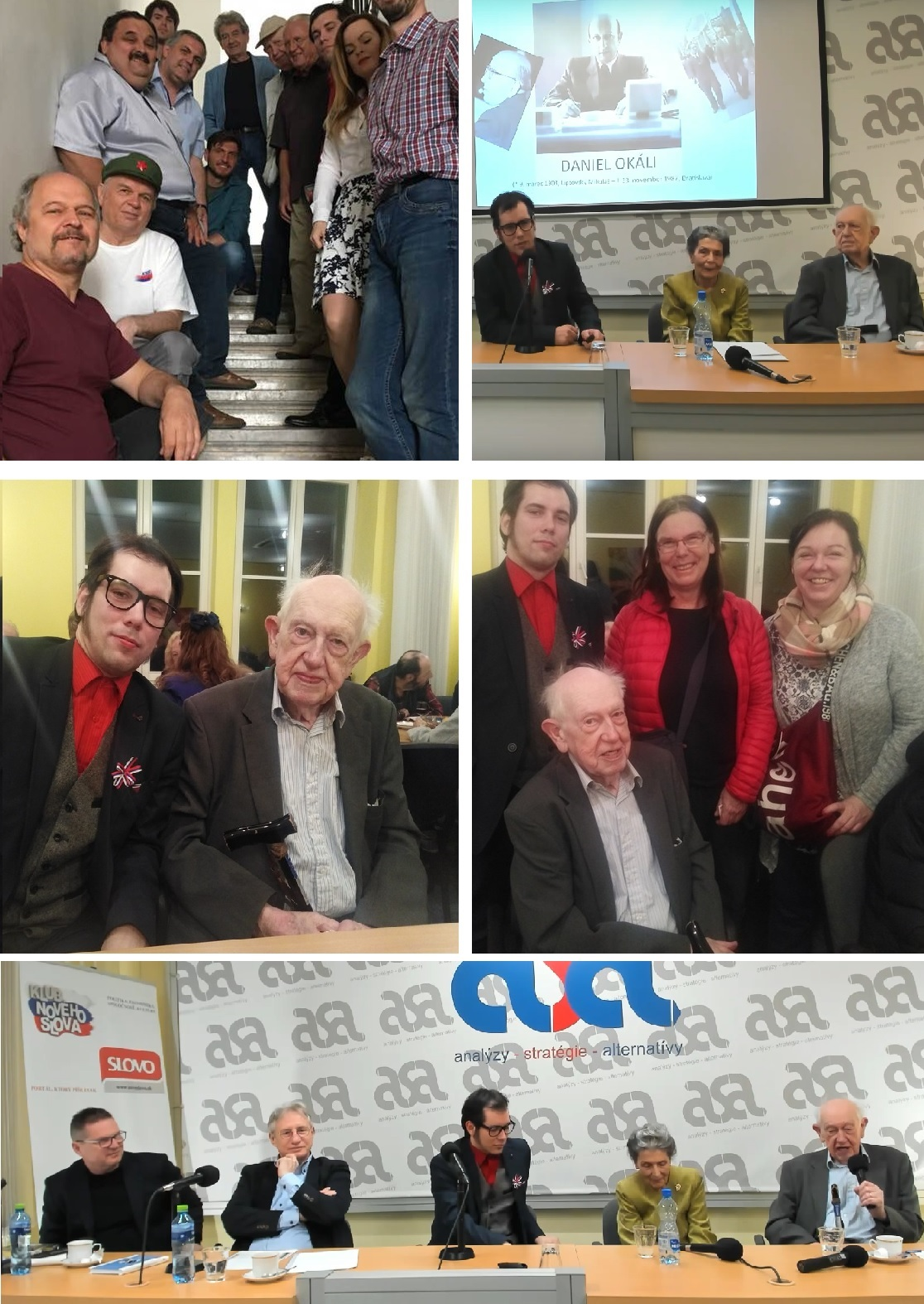 Komunita DAV DVA v Bratislavě se synem Daniela Okáliho, Ivanom Okálim a Ľubošem Blahou